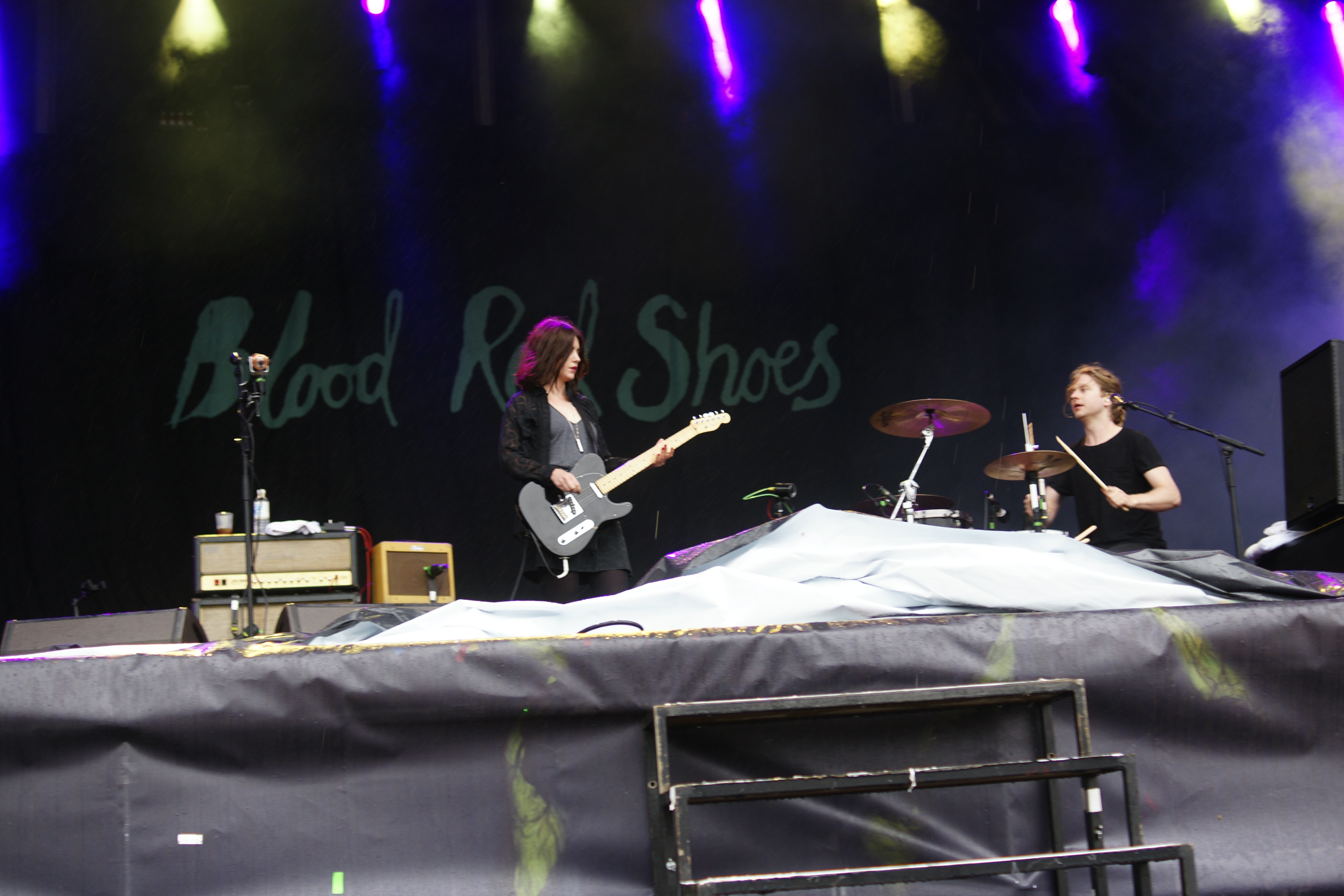 Auftritt Blood Red Shoes, Waterstage, Deichbrand 2015, Seeflughafen Cuxhaven-Nordholz